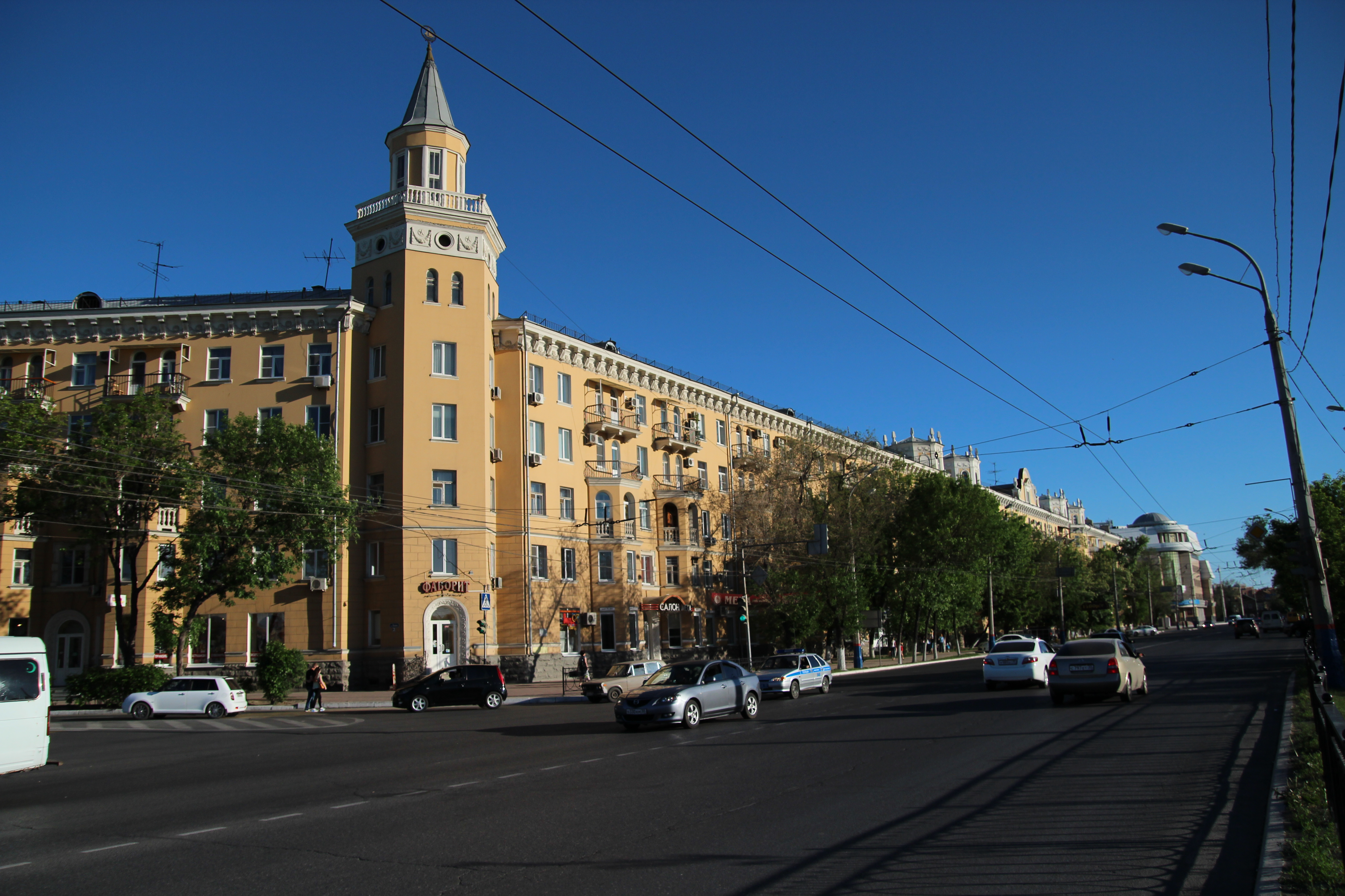 Дом жилой: площадь Ленина, 2 / улица Адмиралтейская, 8, Астрахань, Астраханская область